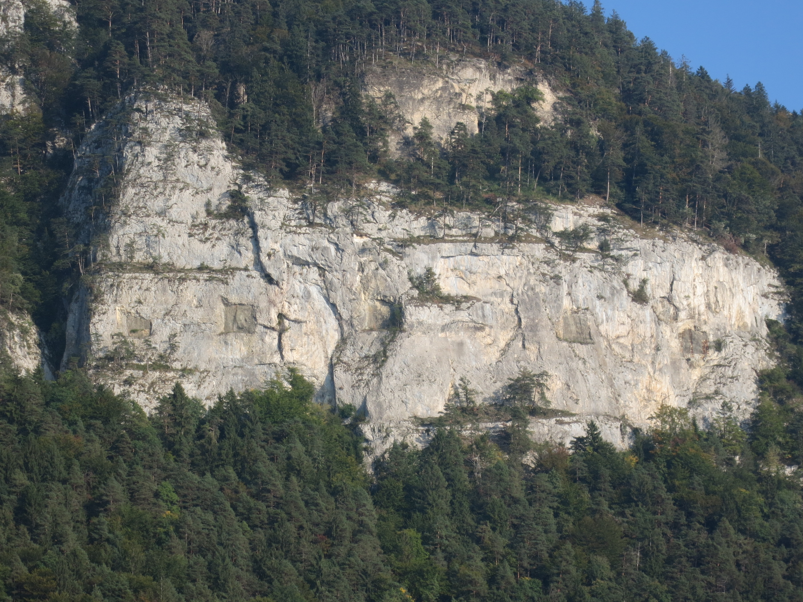 Artilleriewerk Schmockenfluh, Beatenberg BE, Schweiz